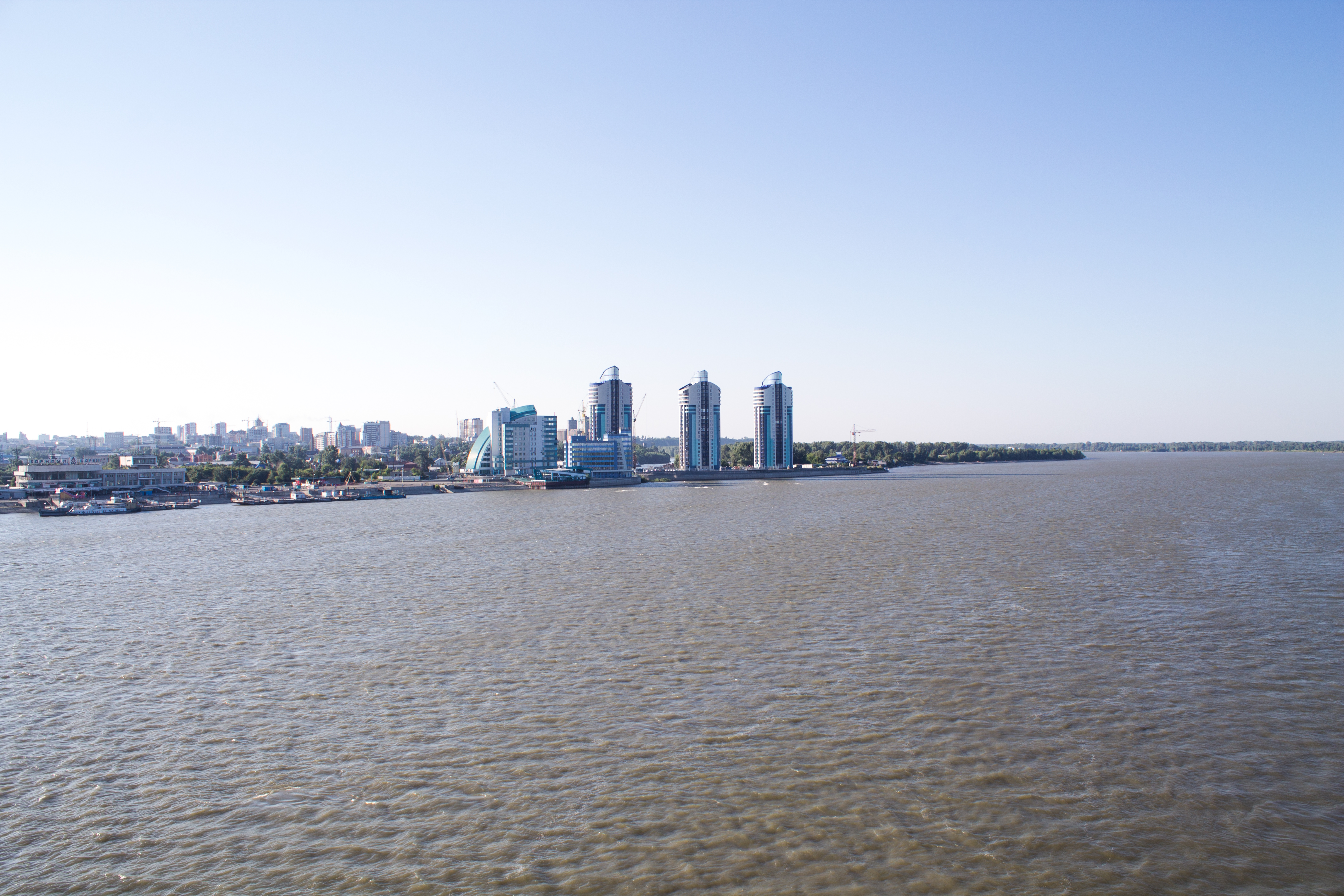 Обь. Вид на жилой комплекс "Аквамарин"